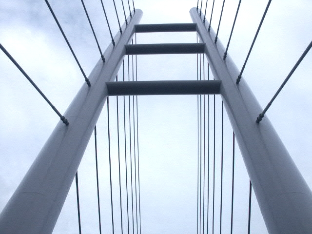 Ruegenbruecke mit Blick hoch zu den Pylonen